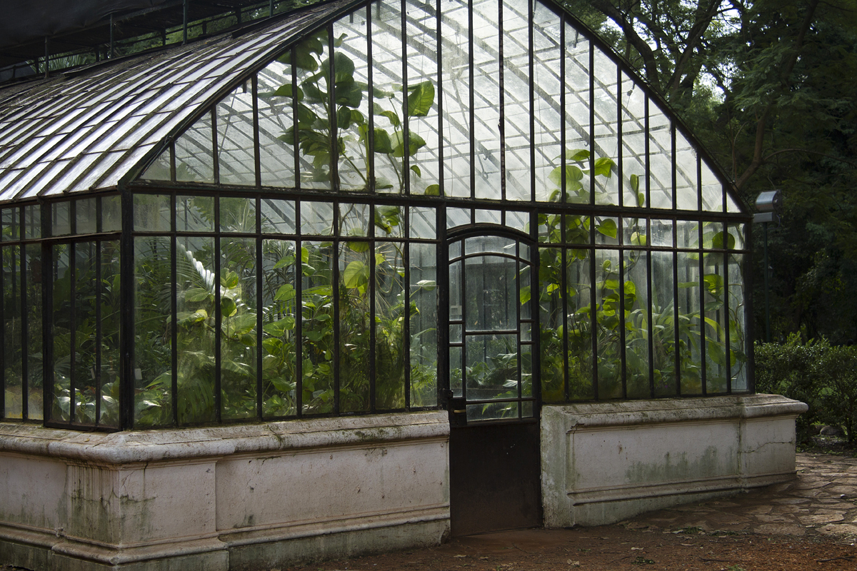 Foto: Estrella Herrera